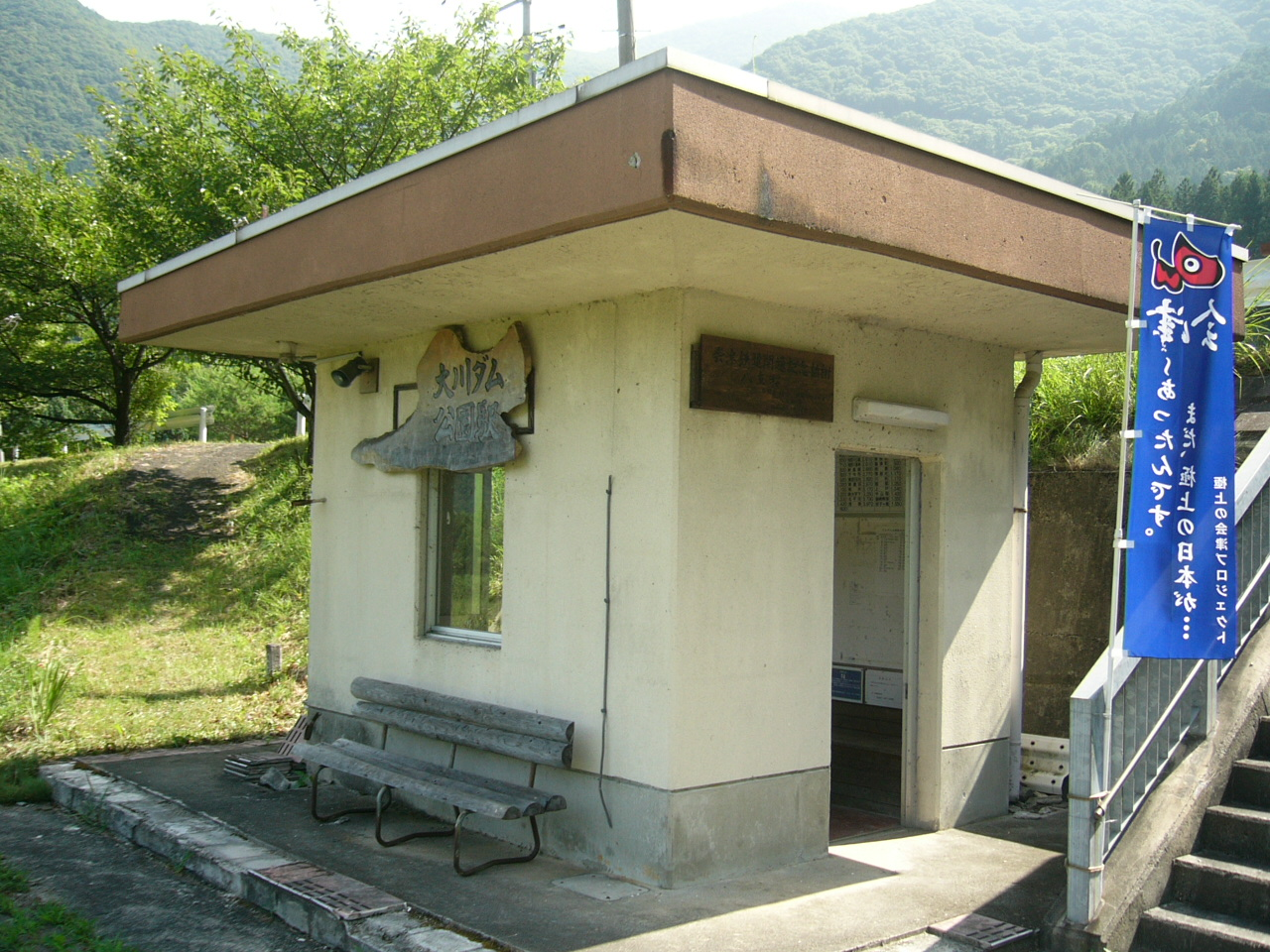 Okawadamukoen Station